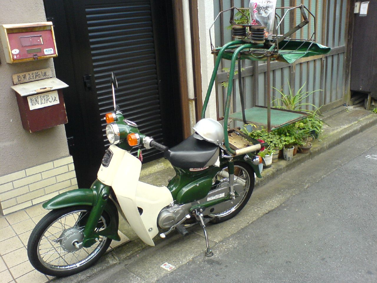 Honda Super Cub Soba delivery Ver.